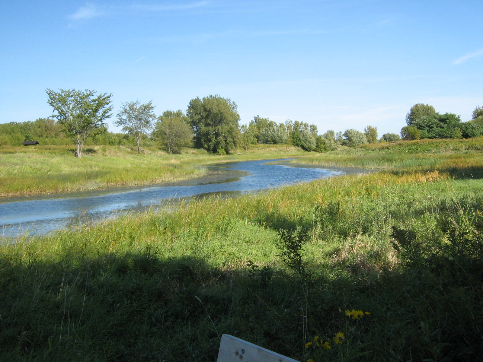 Chenal La Passe dans le parc national des Îles-de-Boucherville